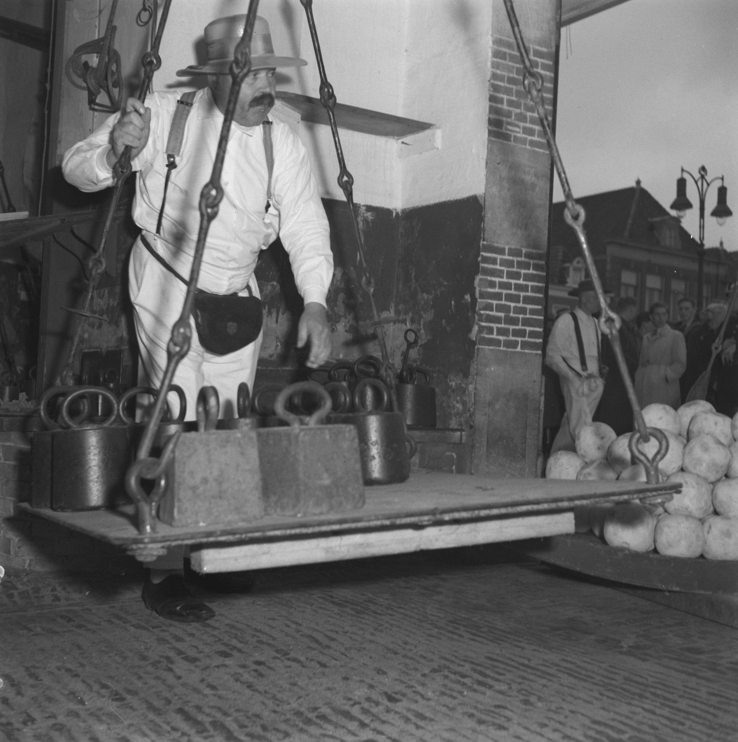 Collectie / Archief : Fotocollectie Anefo Reportage / Serie : [ onbekend ] Beschrijving : Kaasdragersgilde Datum : 23 september 1946 Fotograaf : Wisman, Bram / Anefo Auteursrechthebbende : Nationaal Archief Materiaalsoort : Negatief (zwart/wit) Nummer archiefinventaris : bekijk toegang 2.24.01.03 Bestanddeelnummer : 901-9261